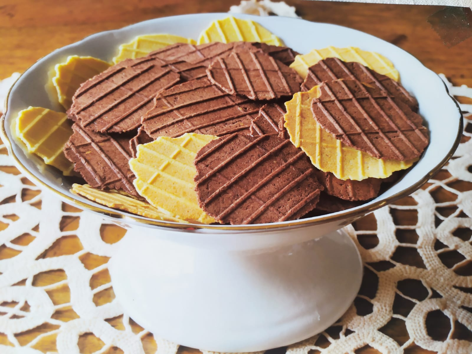 Dolci artigianali tipici di Cinaglio (AT)